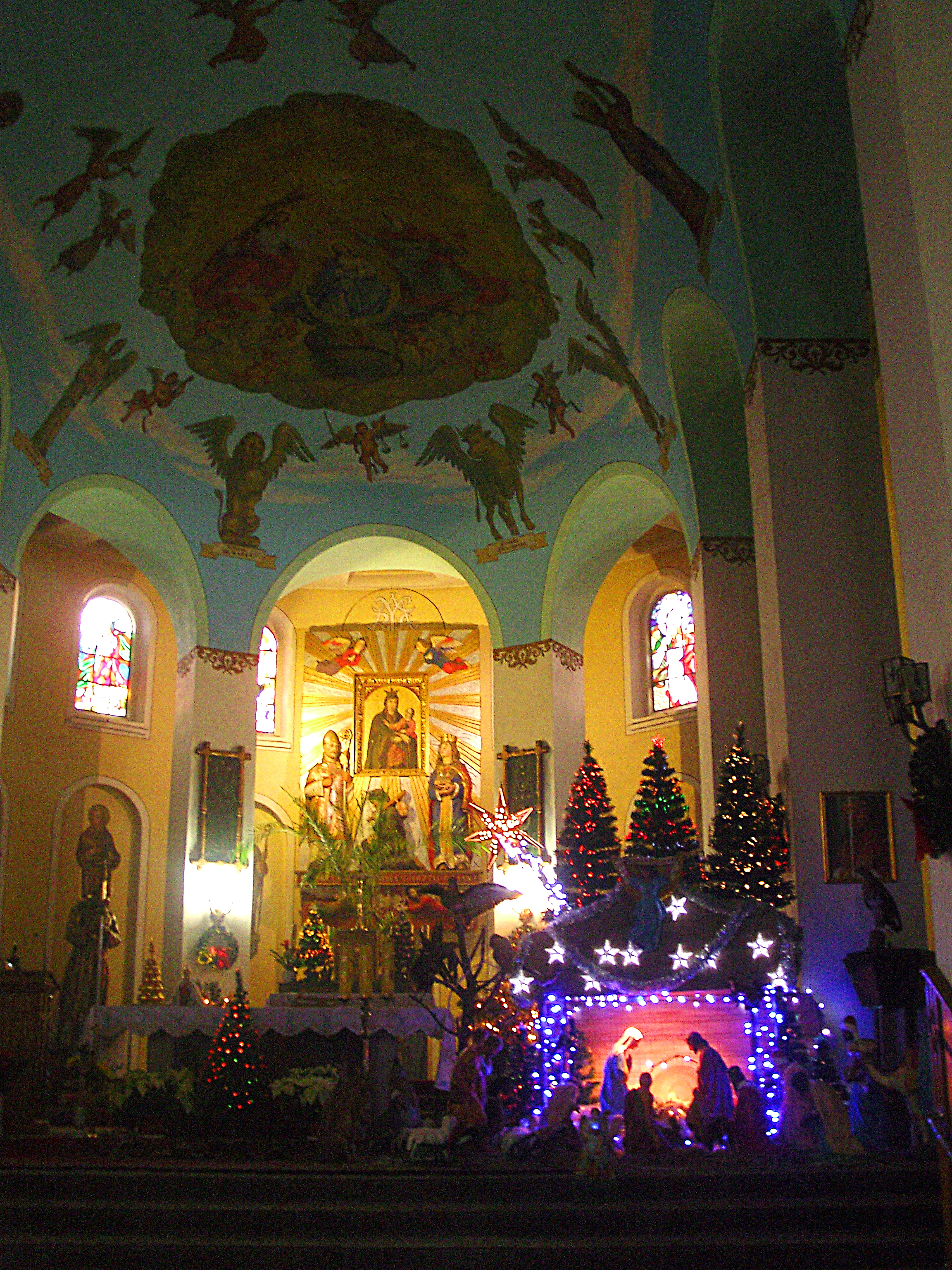 Szopka bożonarodzeniowa w kościele parafialnym Imienia Maryi w Bączalu Dolnym, województwo podkarpackie